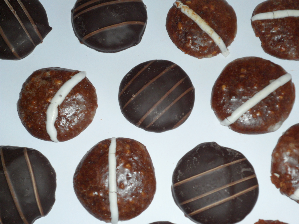 Neisser Konfekt Schläsch: Neisser Konfekt oder Neisser Pfafferkucha ies anne Pfafferkucha-Spezialität aus Neisse.